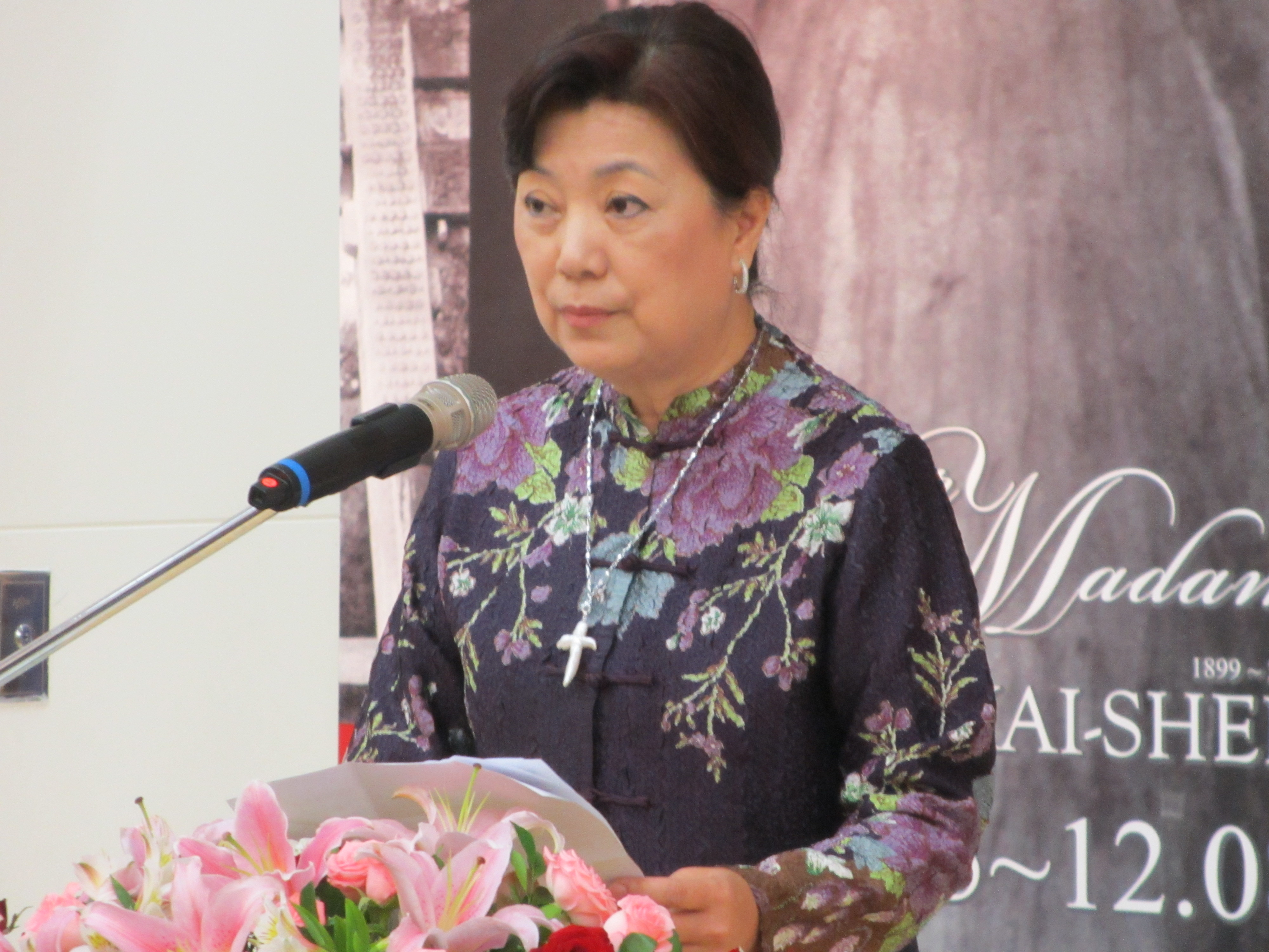 蔣經國的兒媳婦蔣方智怡。